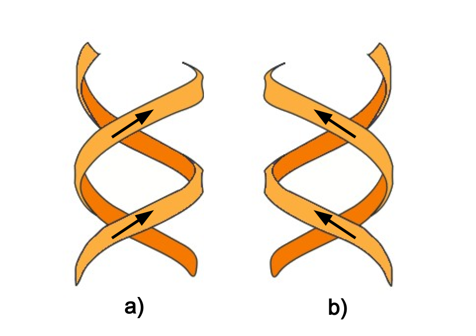 a) rechtsgängige, b) linksgängige Doppelhelix.